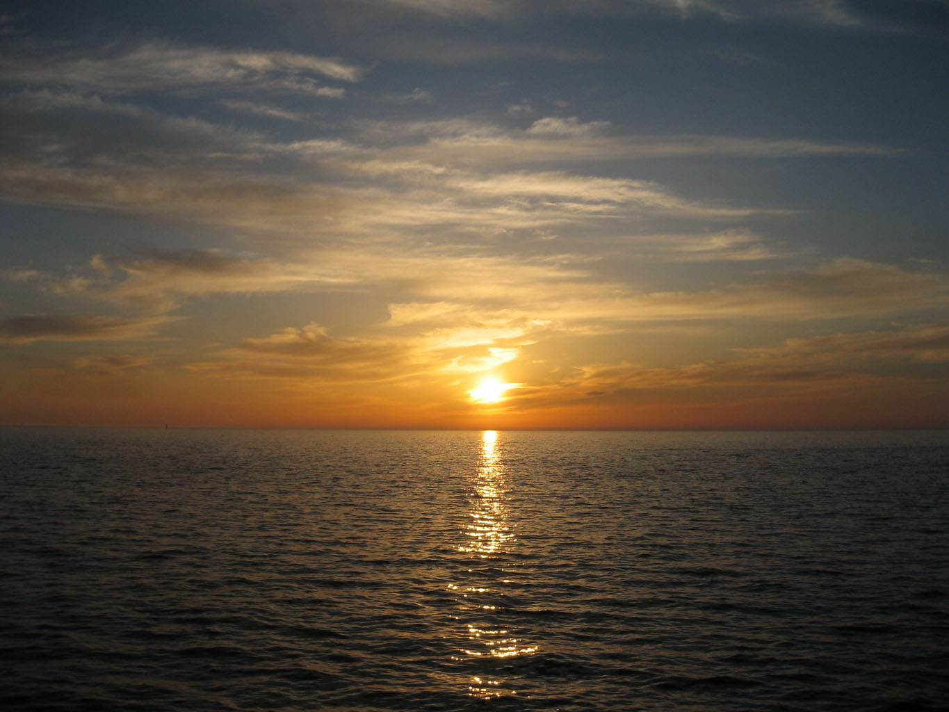 Ocaso desde la Punta del Perro, en Chipiona (España) / Sunset in Chipiona